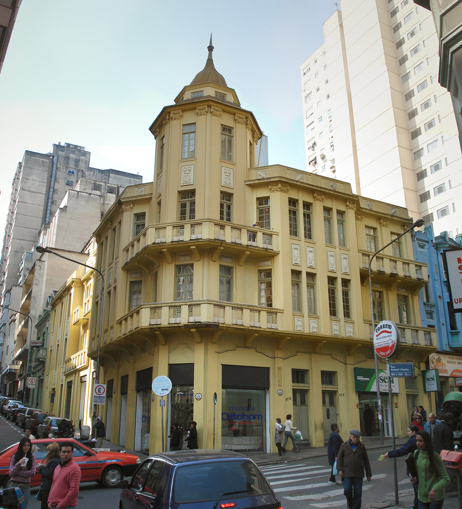 Prédio João Paz Moreira, com projeto de Theodor Wiederspahn, Porto Alegre, Brasil.